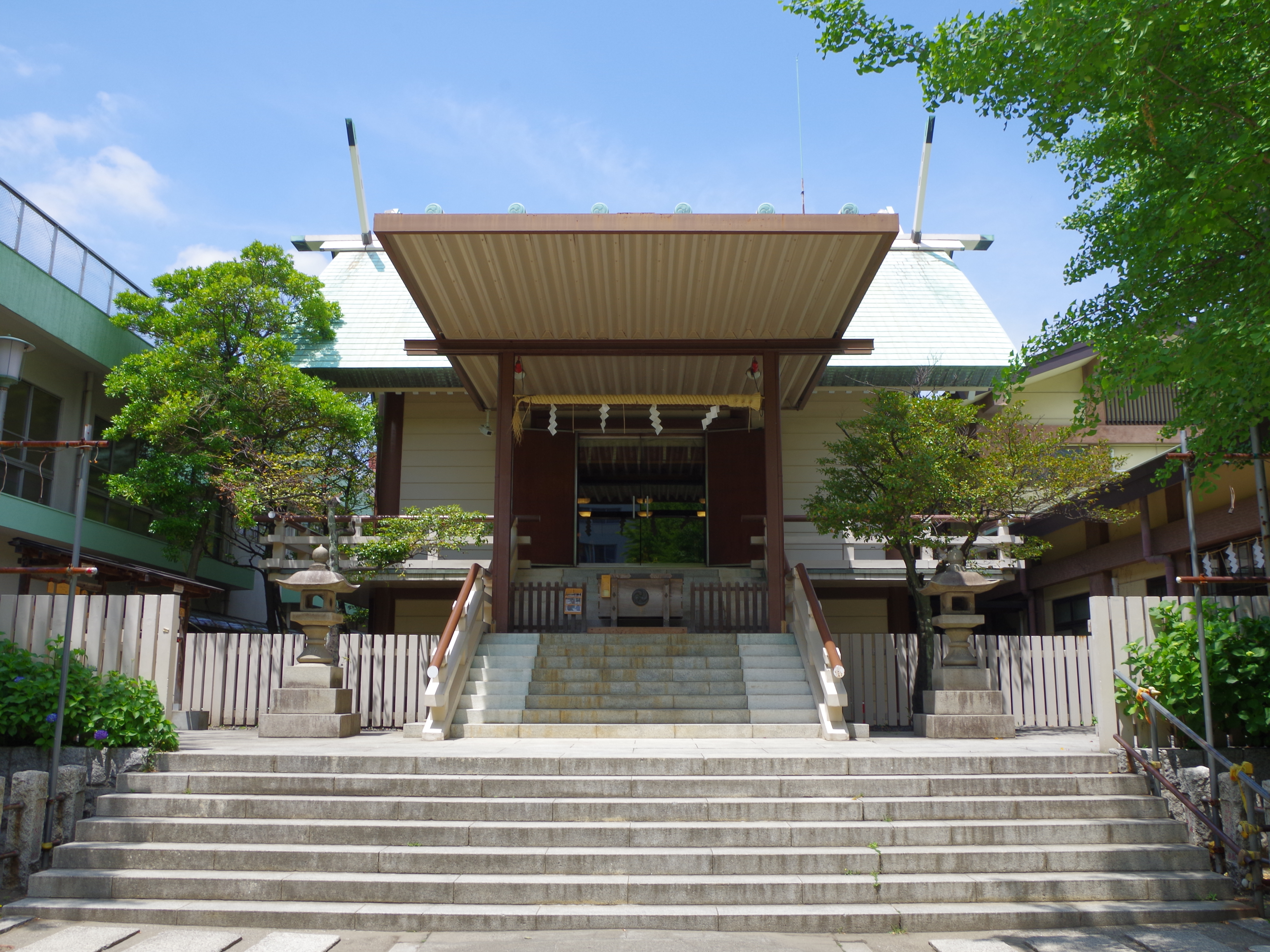 深川神明宮 江東区森下1丁目 2013.5.18